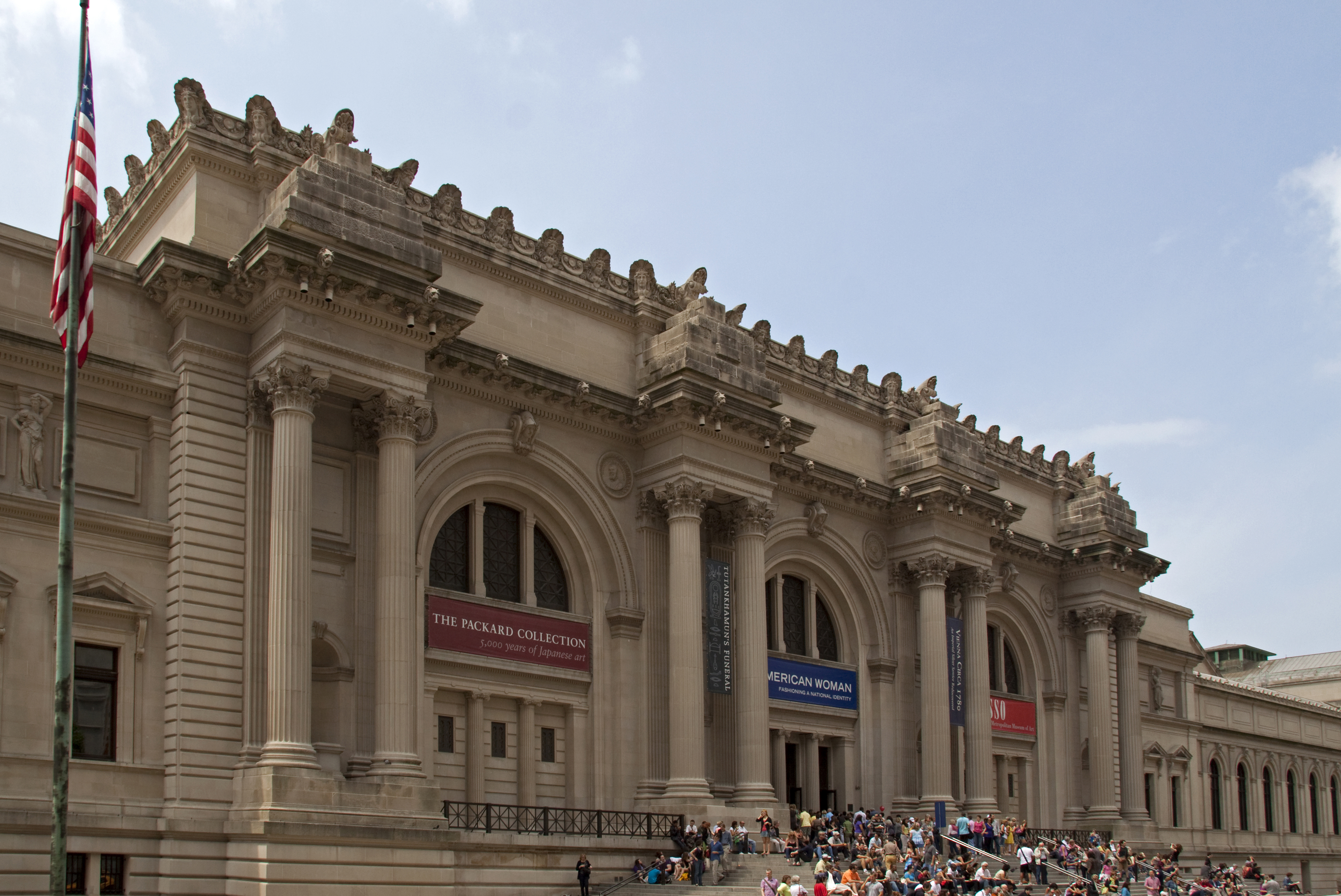 Metropolitan Museum 1